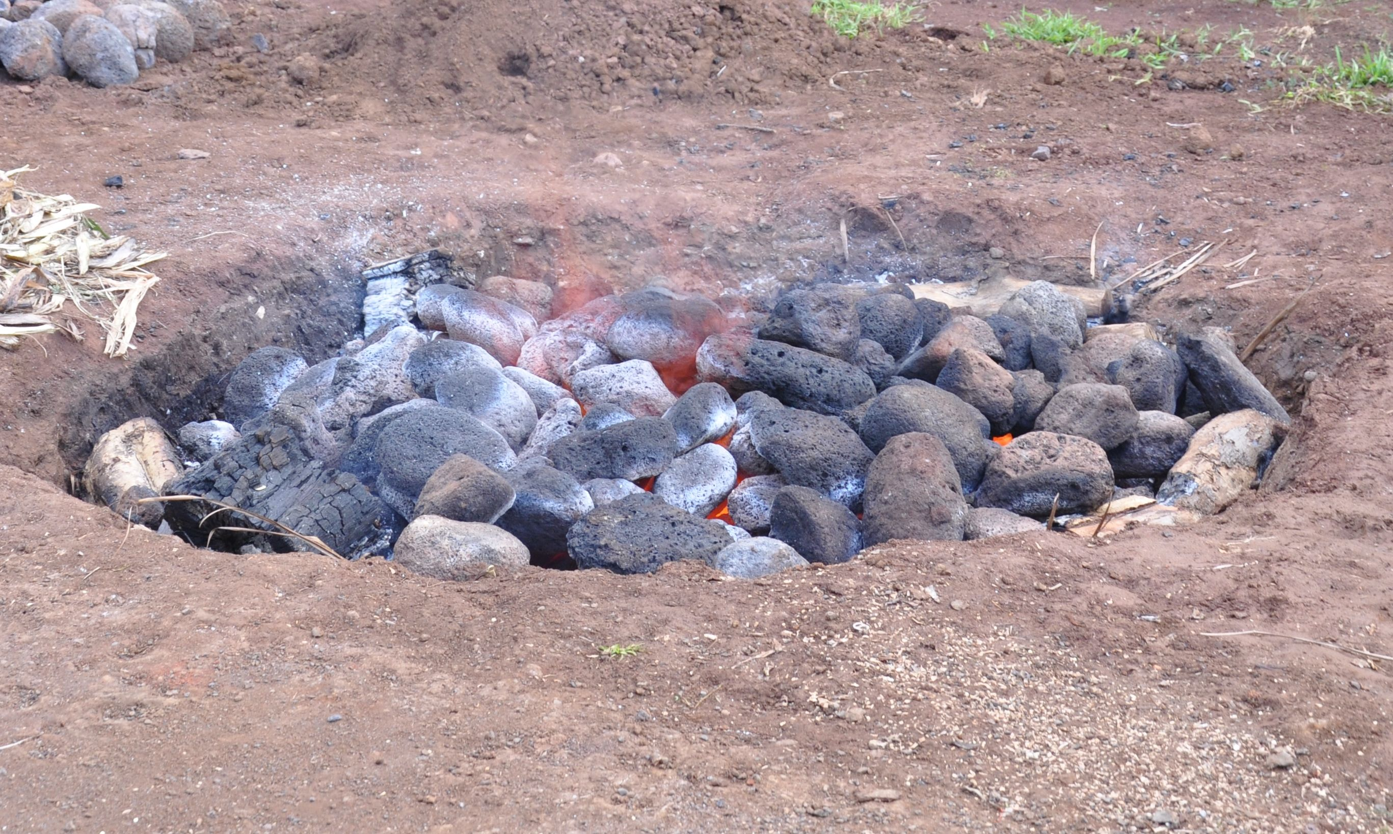 Chauffage des pierres volcaniques